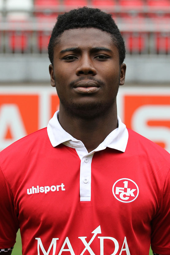 Manfred Osei Kwadwo